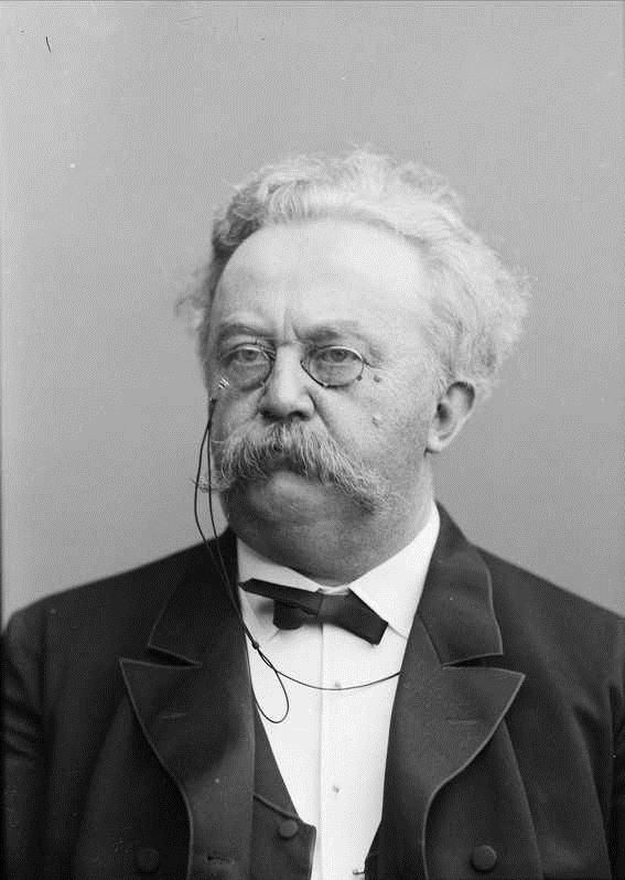 Den norske politikeren Hans Rasmus Astrup.